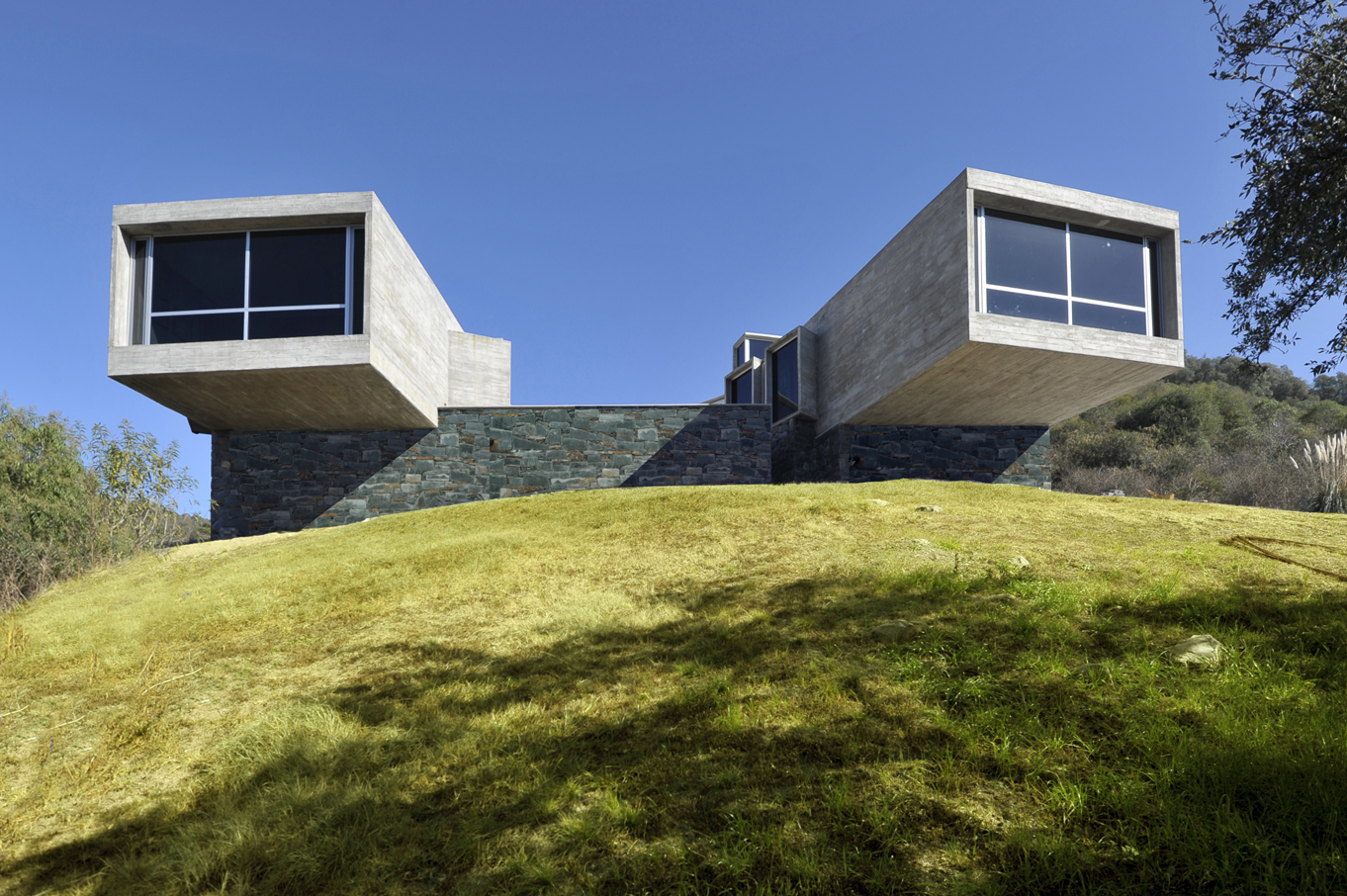 Casa Nekola (Miguel Ángel Roca, 2008-11). Río Ceballos, Córdoba, Argentina.